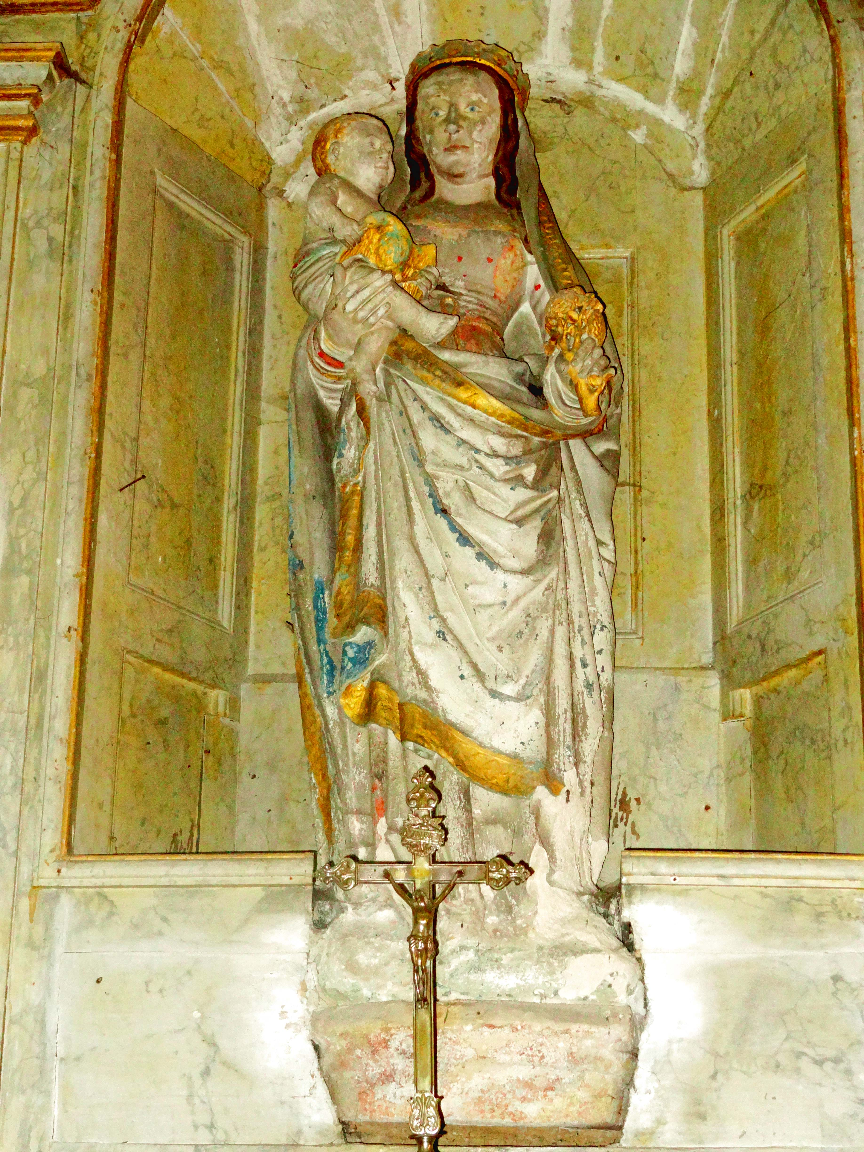 Mobilier de l'église - voir titre.